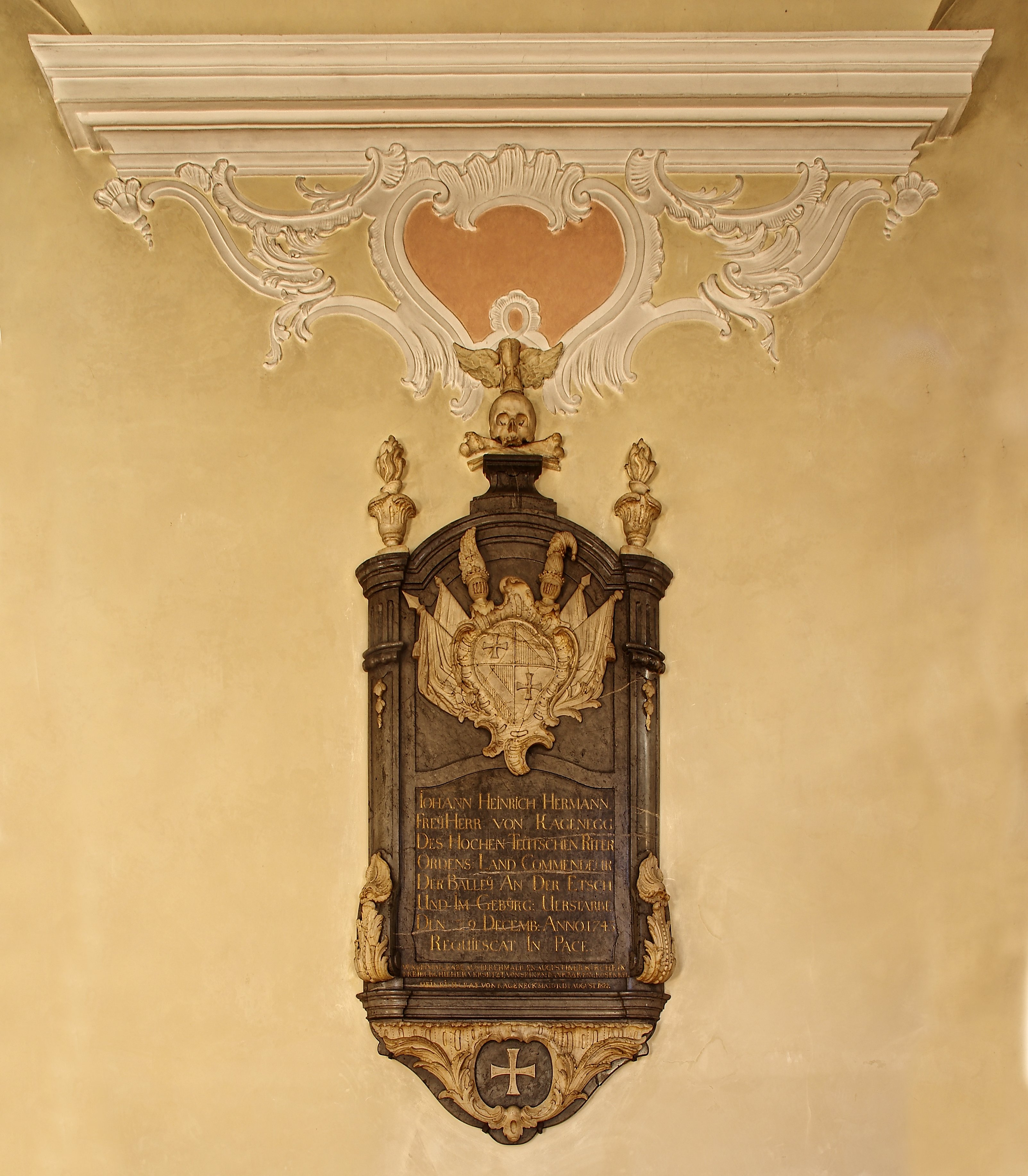 St. Stephan (Munzingen), Epitaph Johann Heinrich Hermann Freiherr von Kageneck, Landkomtur der Ballei an der Etsch und im Gebirg